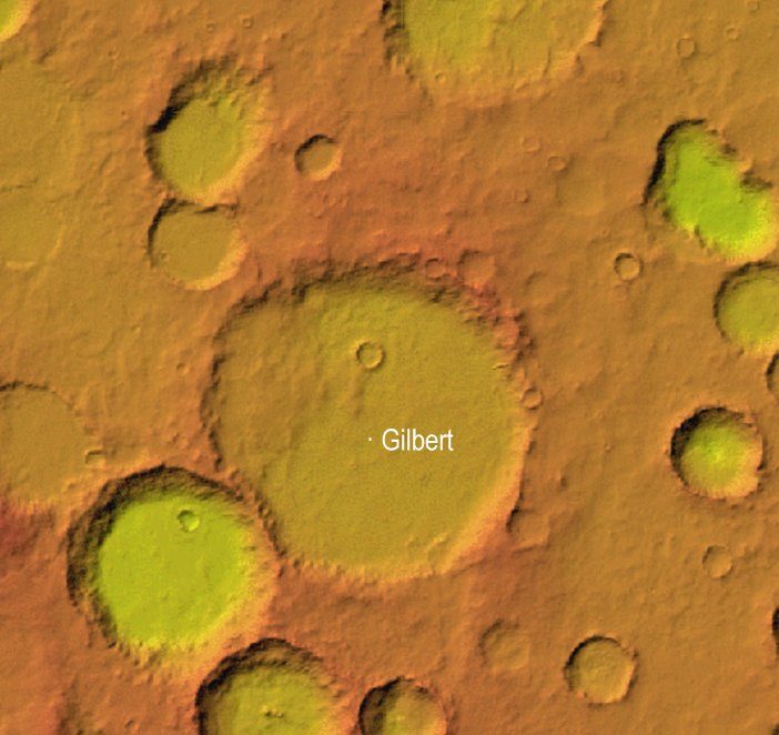 Cráter marciano Gilbert. (Imagen IAU/USGS/Goddard/A SU/USGS)